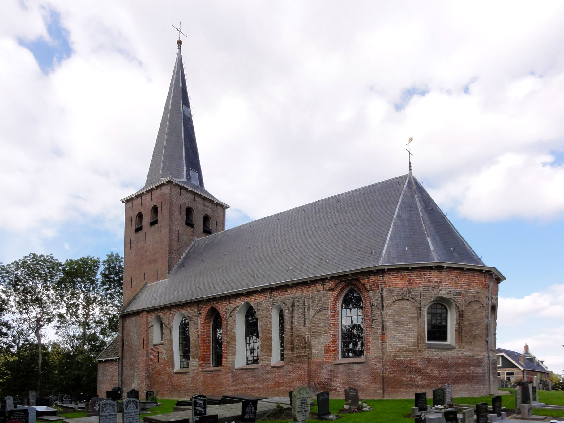 Nicolaaskerk van Hantum, rijksmonument